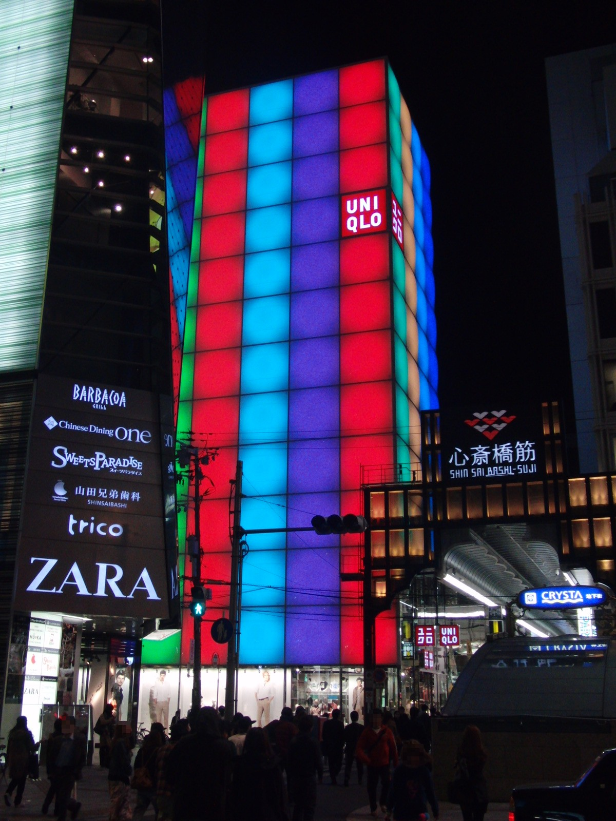 ユニクロ大阪心斎橋店を撮影